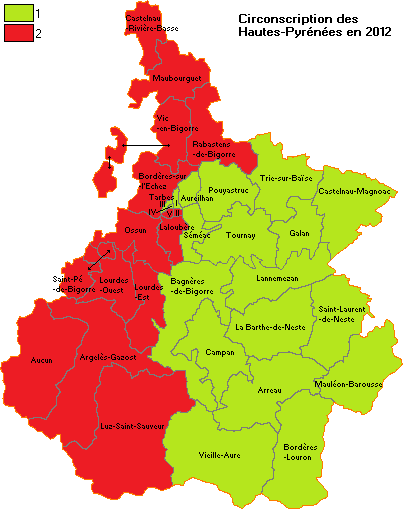 Circonscription des Hautes-Pyrénées en 2012